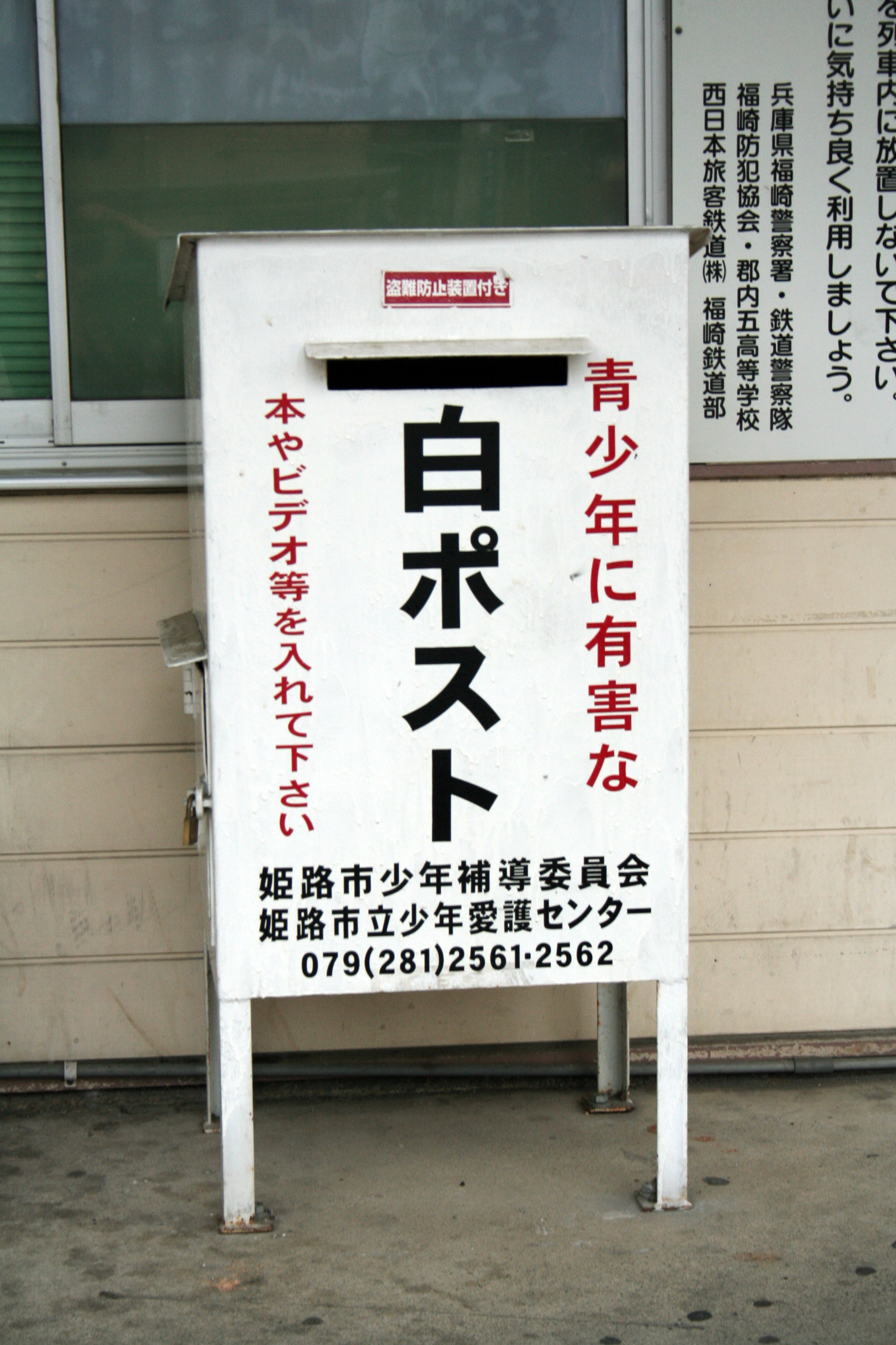 香呂駅。駅舎出入り口脇の白ポスト。